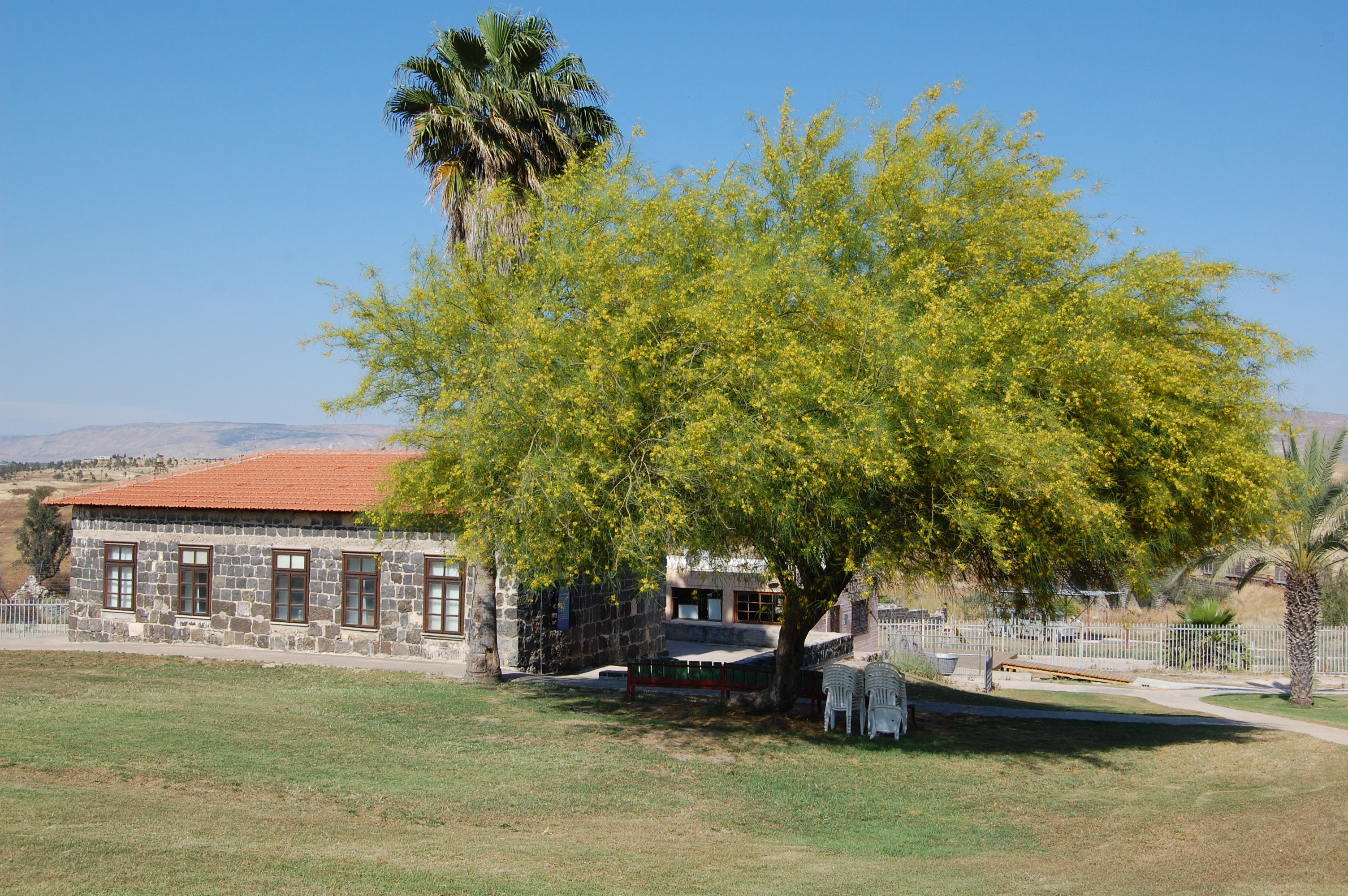 גשר הישנה ונהריים